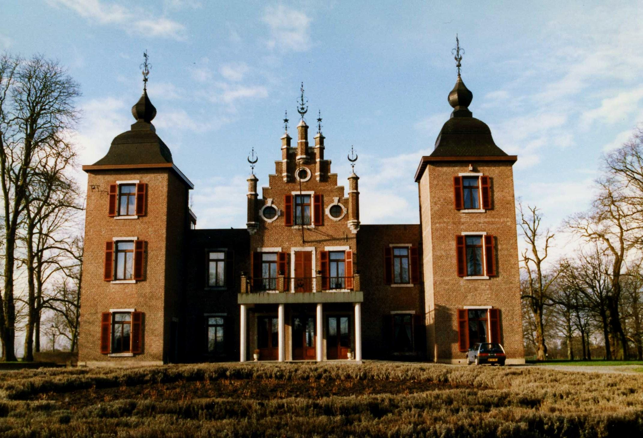 Kasteel ter Borgh te Roosteren.